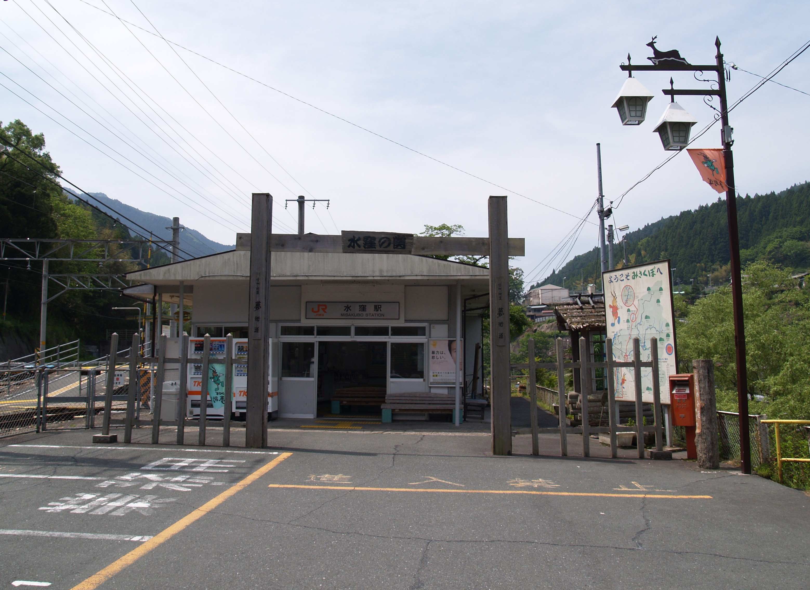 水窪駅